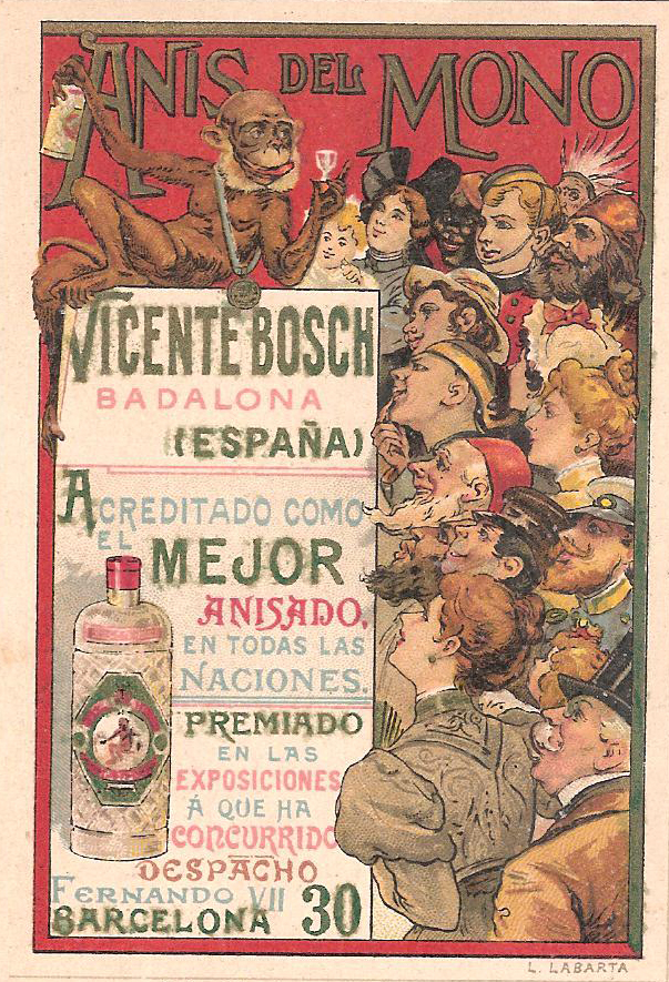 Anís del Mono. Referencias.